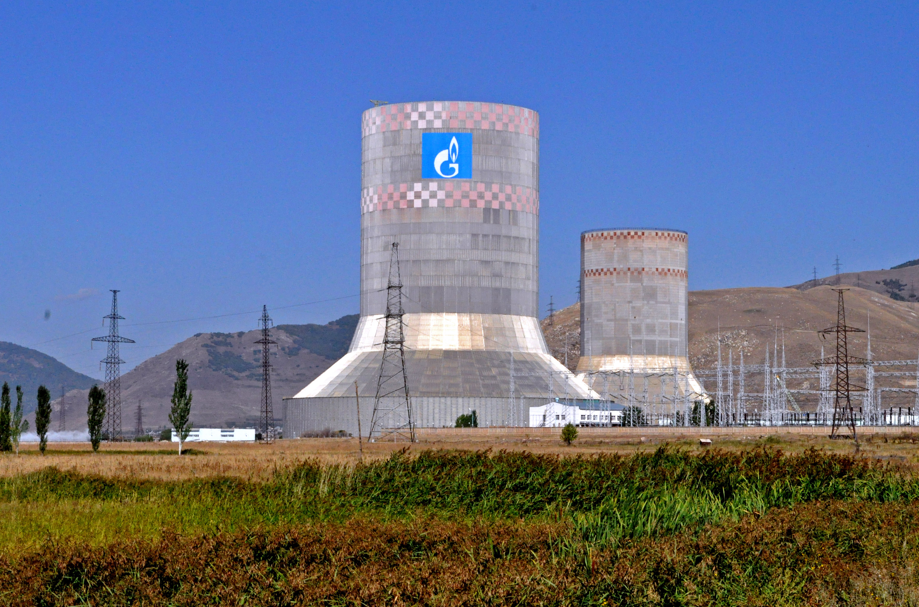 5-ый энергоблок Разданской ТЭС